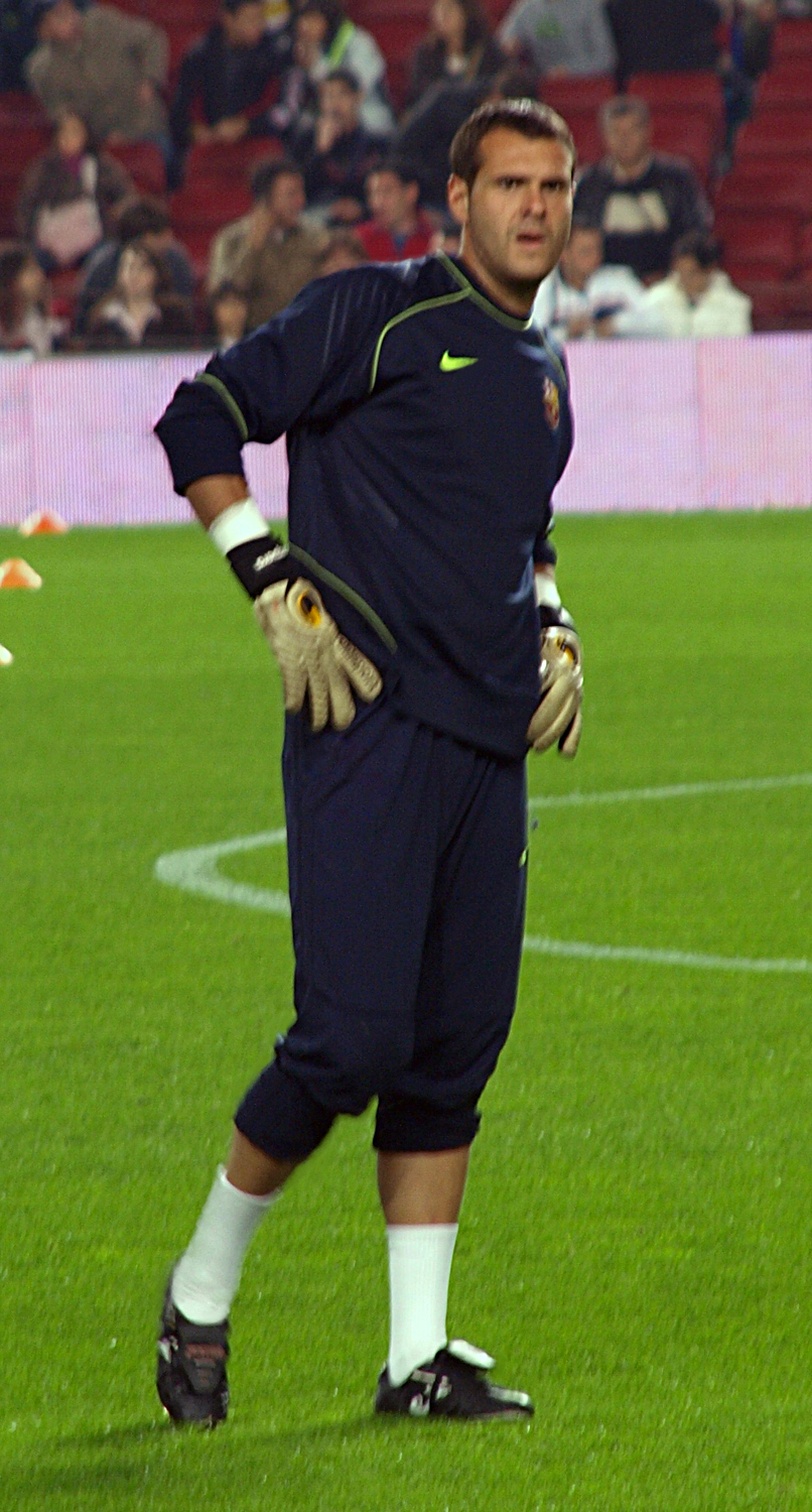 Albert Jorquera